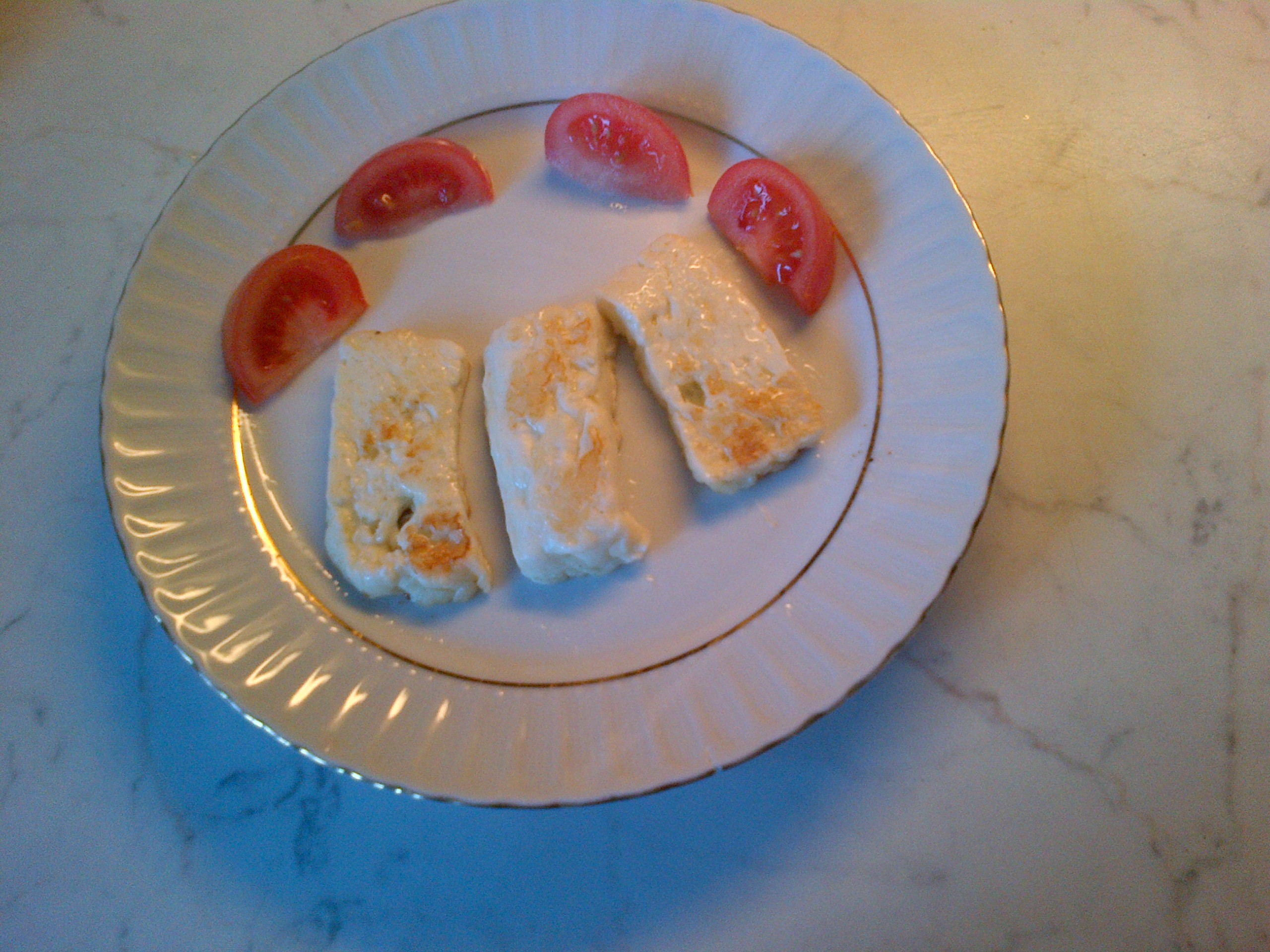 Hellim turco de la RTNC hecho a la sartén.